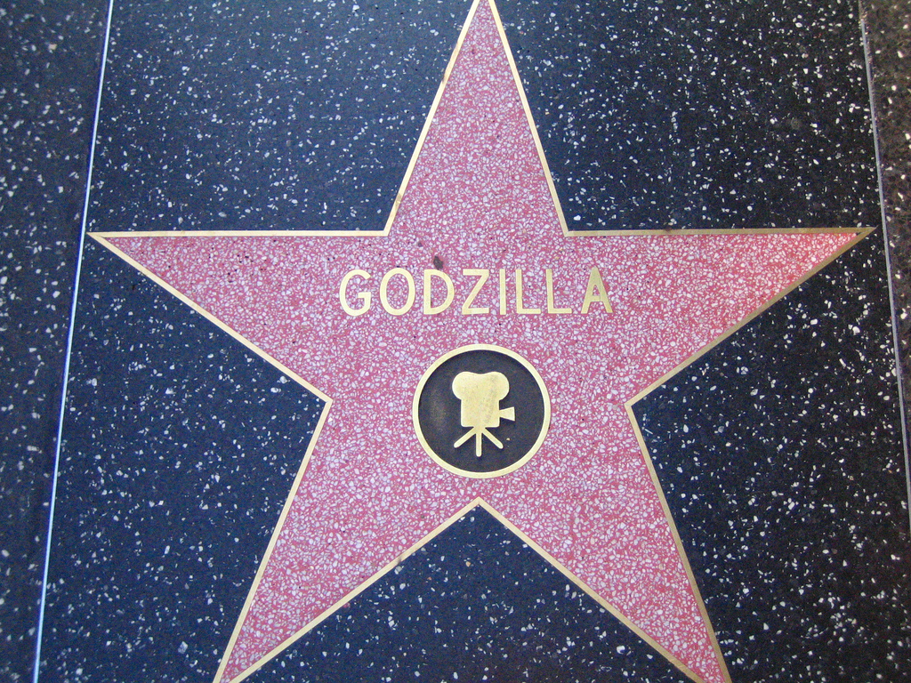 Godzilla star